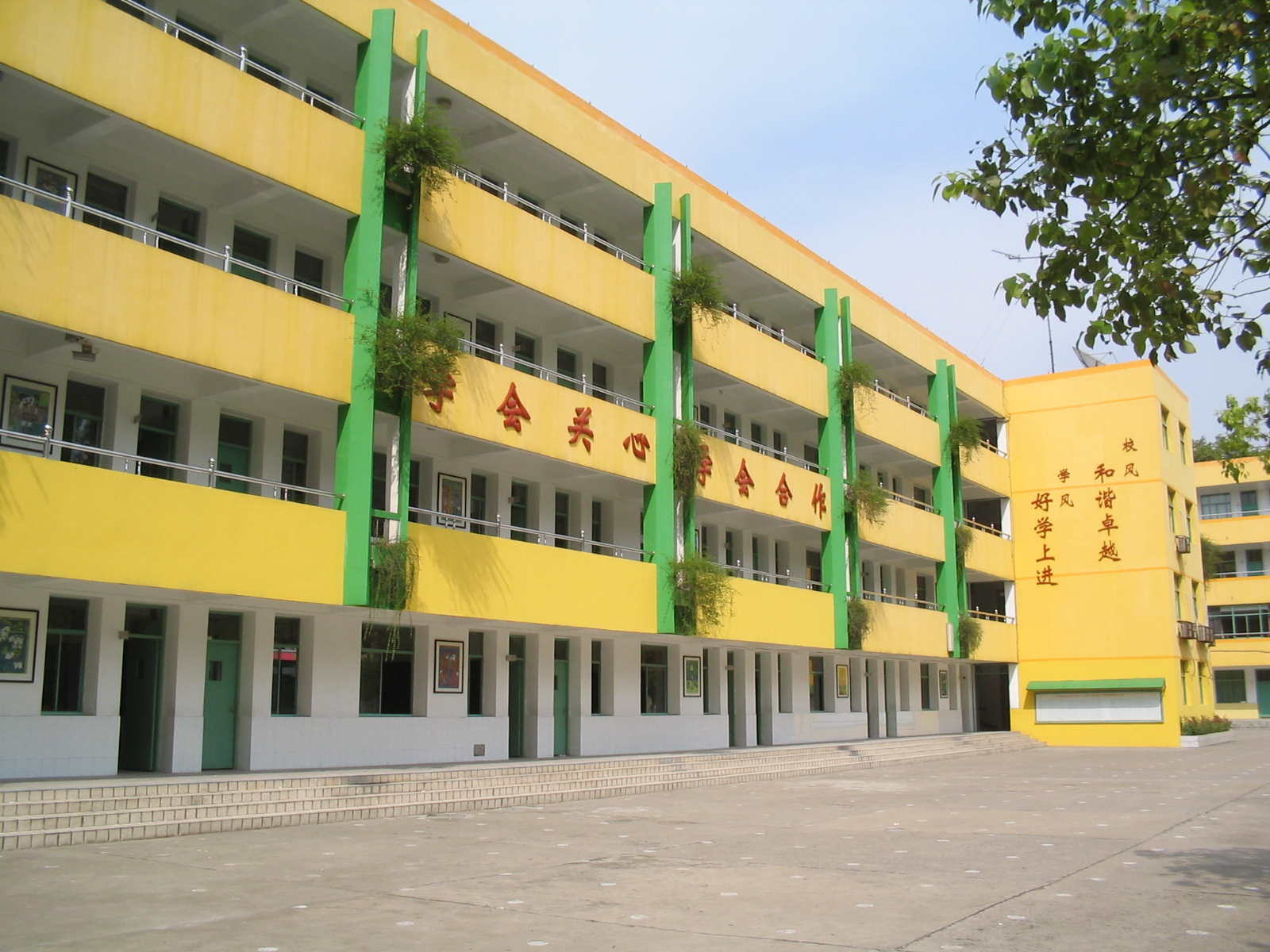 长江路小学教学楼，2005年8月10日在南京拍摄。